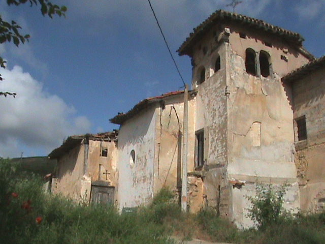 Antigua Iglesia, Campanario, Cementerio en la localidad burgalesa de Villalbos